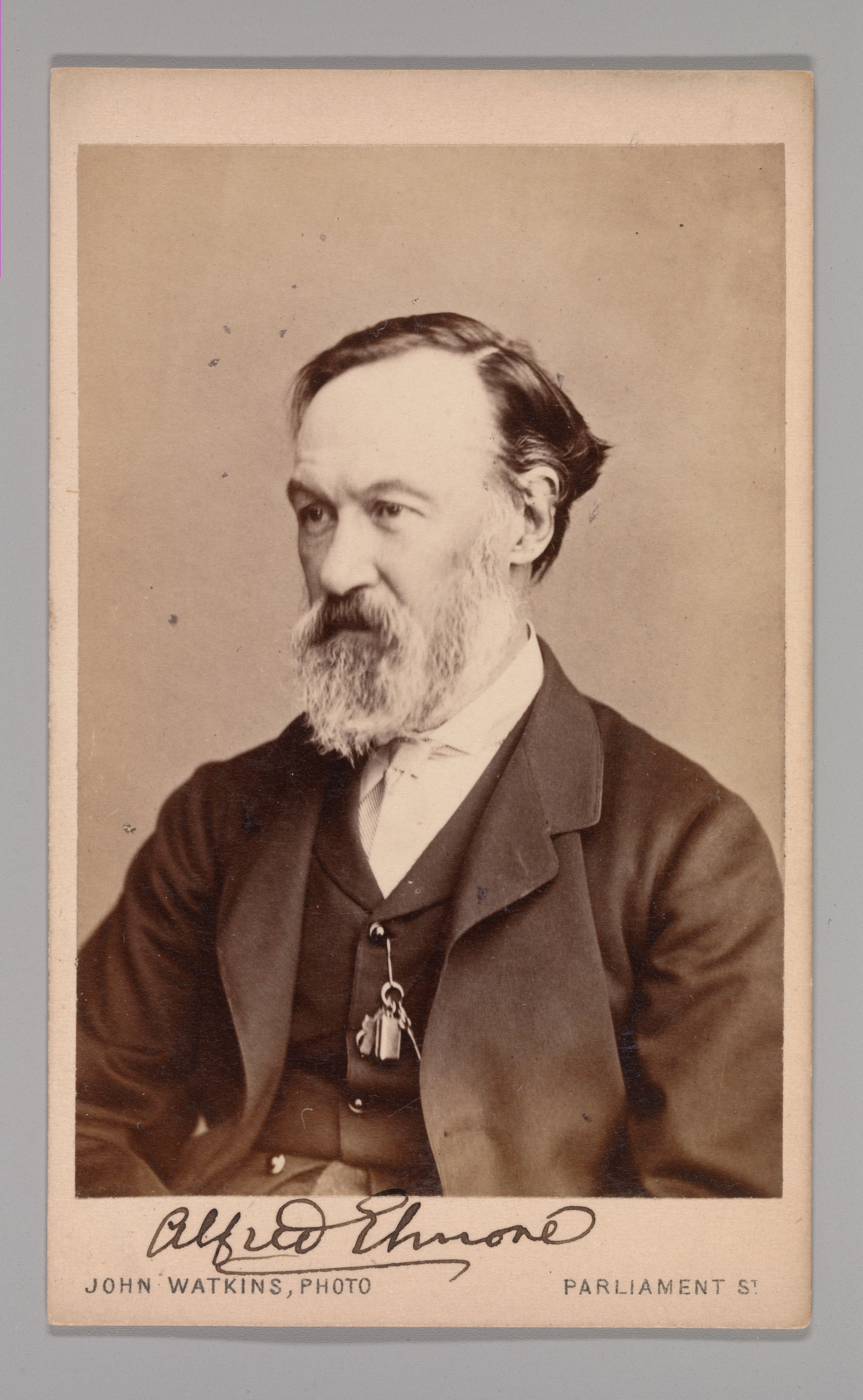 Carte-de-visite; Photographs